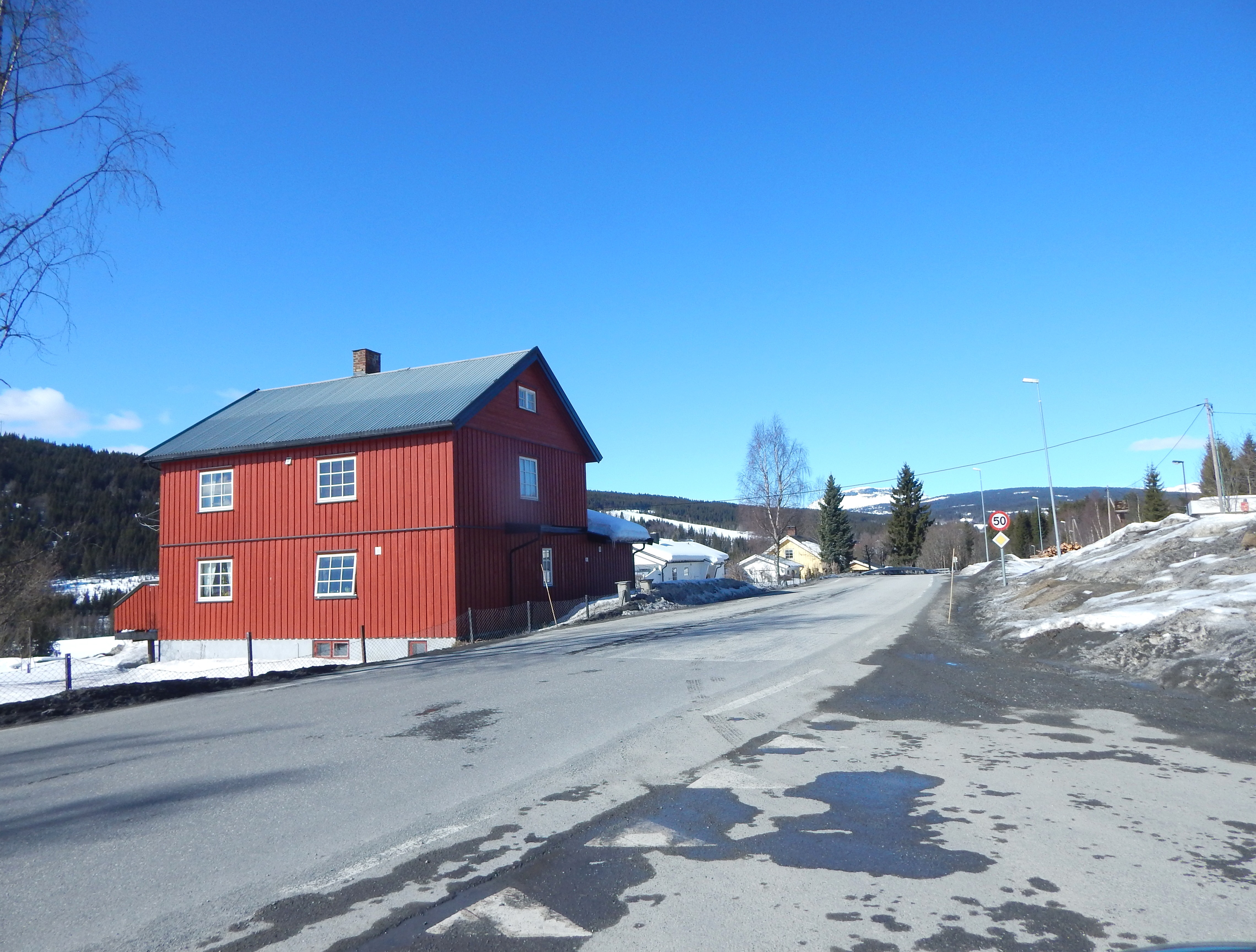 Skeisvegen (fylkesvei 2544, tidl. 337) på Svingvoll